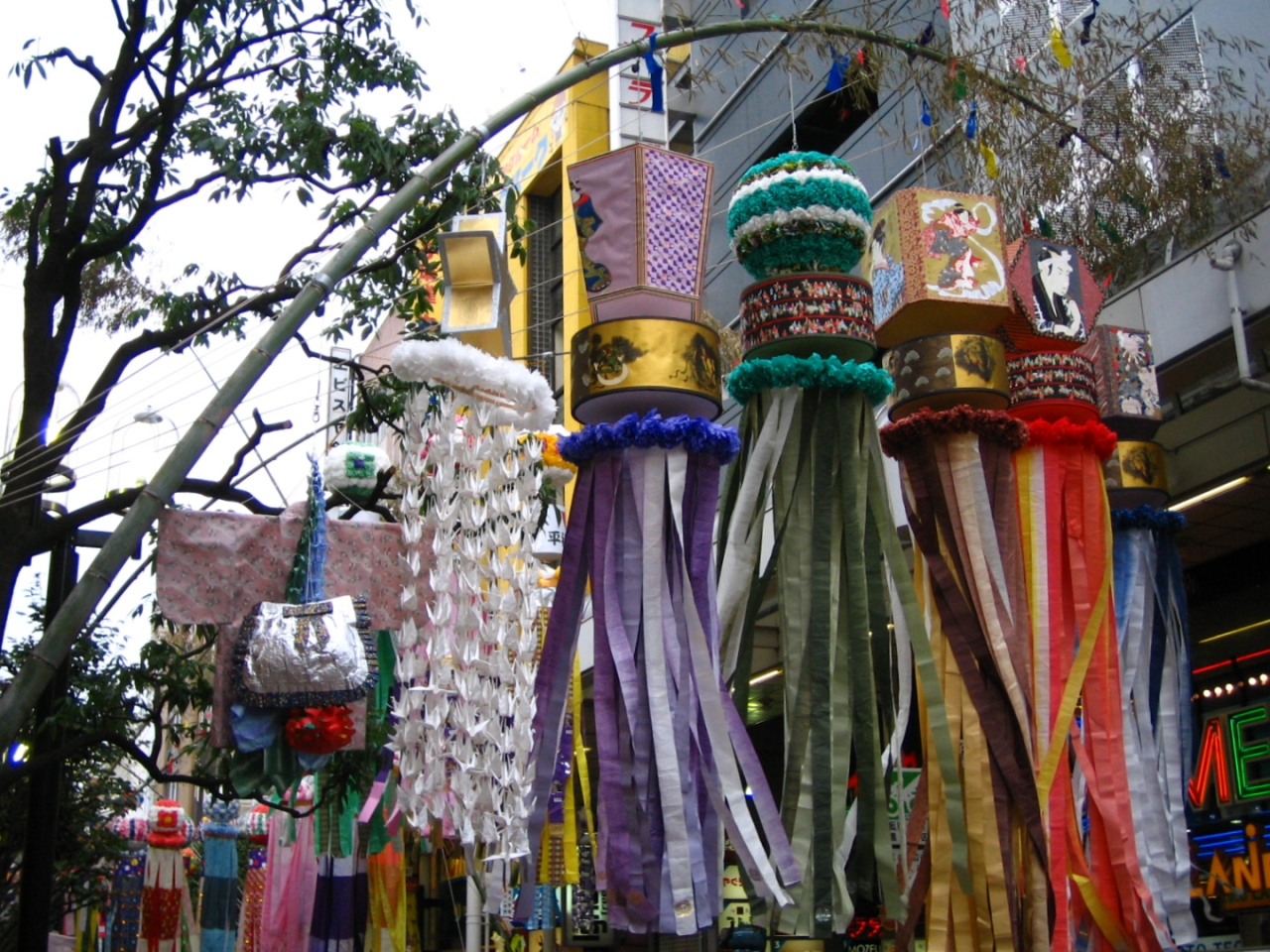 The_Sendai_Tanabata_Festival.JPG